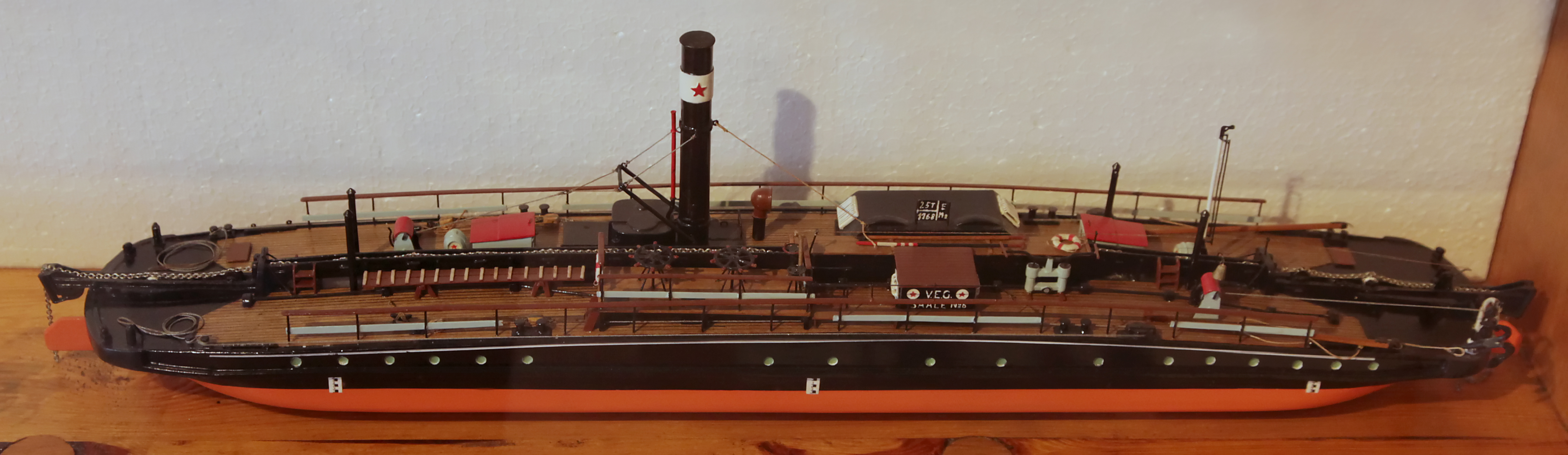 Modell des Kettenschleppdampfer "VEG Saale Nr. 6" aus der Sammlung Grötschel. Eigner: Vereinigte Elbschiffahrts-Gesellschaft (VEG), Dresden. Der Kettenschleppdampfer wurde 1903 in Dresden, Uebigau, für den Betrieb auf der Saale gebaut. Nach der Einstellung der Kettenschifffahrt auf der Saale im Jahre 1921 fuhr der Dampfer auf der Elbe. Mit dem Zusammenschluss der Vereinigte Elbschiffahrts-Gesellschaft und der NNFDG zur Neuen Norddeutschen Vereinigten Elbschiffahrt wurde der Kettenschleppdampfer in "NNVE 9" umbenannt. Mit der Zerstörung von Magdeburg im Januar 1945 wurde der Schlepper ebenfalls stark beschädigt und kam nicht wieder in Fahrt. Länge 34,60m, Breite 6,00m, Maschinenleistung 100PS.